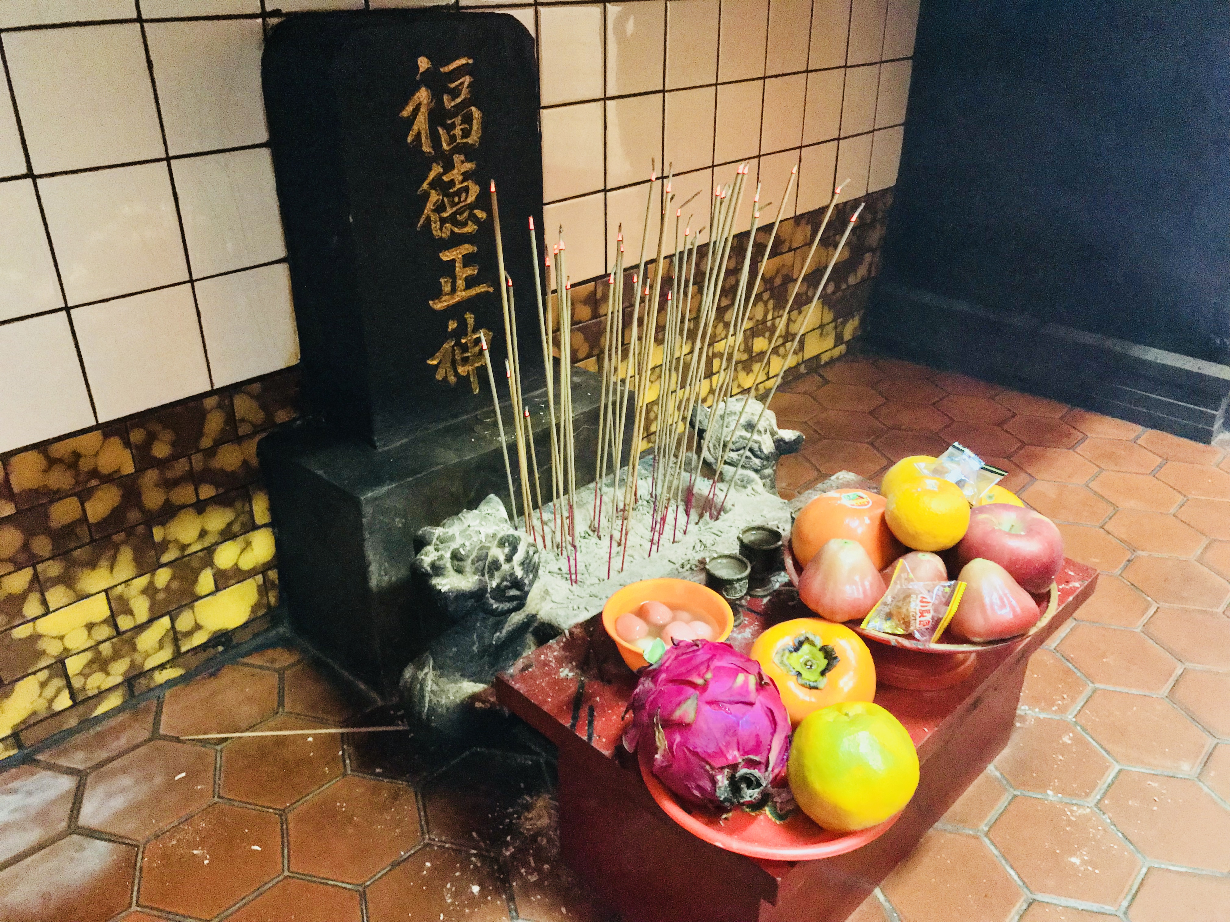 景美福興宮福德正神石碑